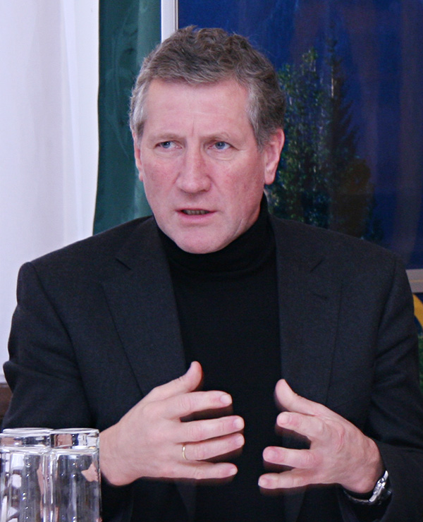 Erich Schwärzler, Vorarlberger Landespolitiker.